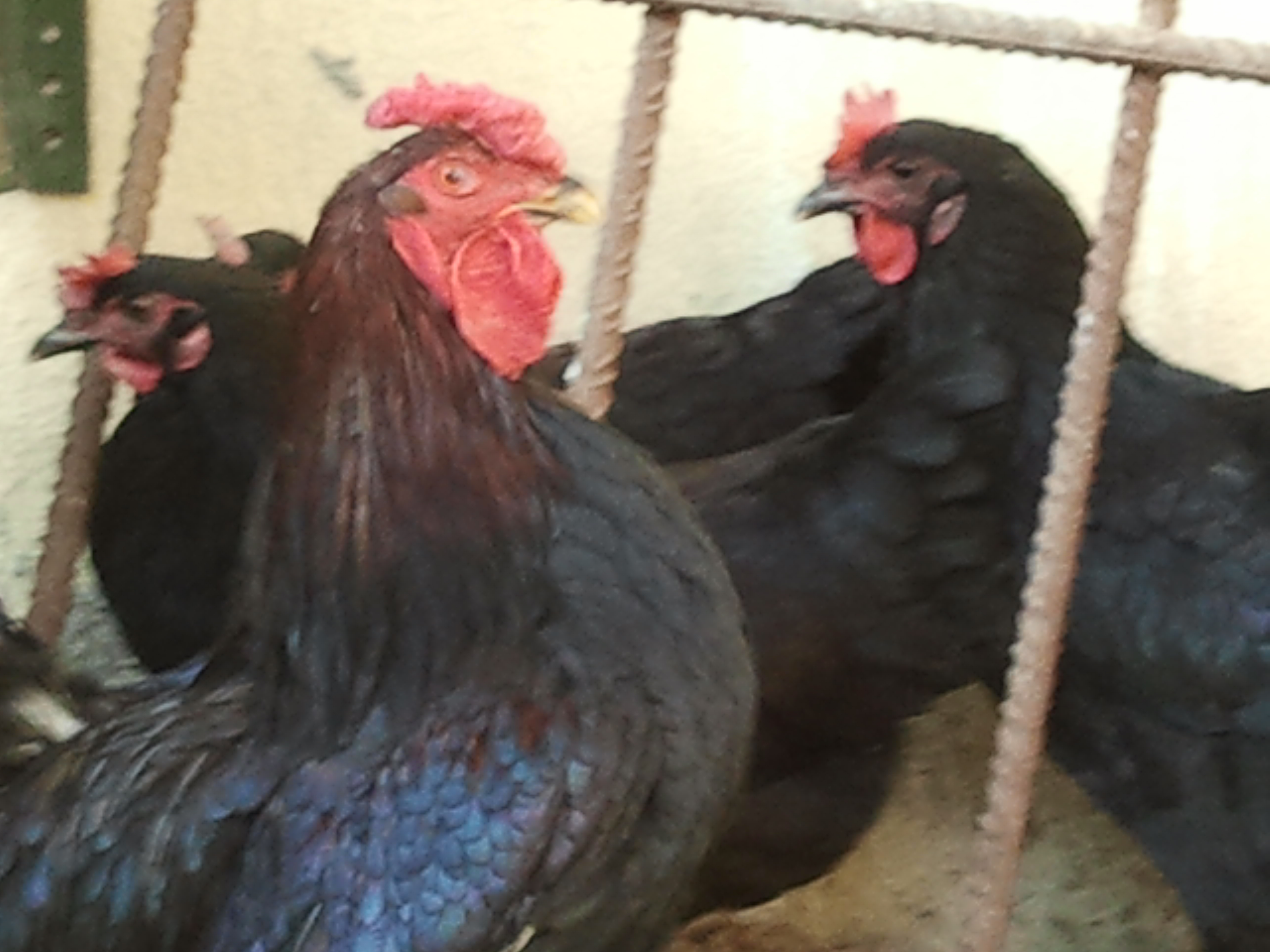 gallo serrano2